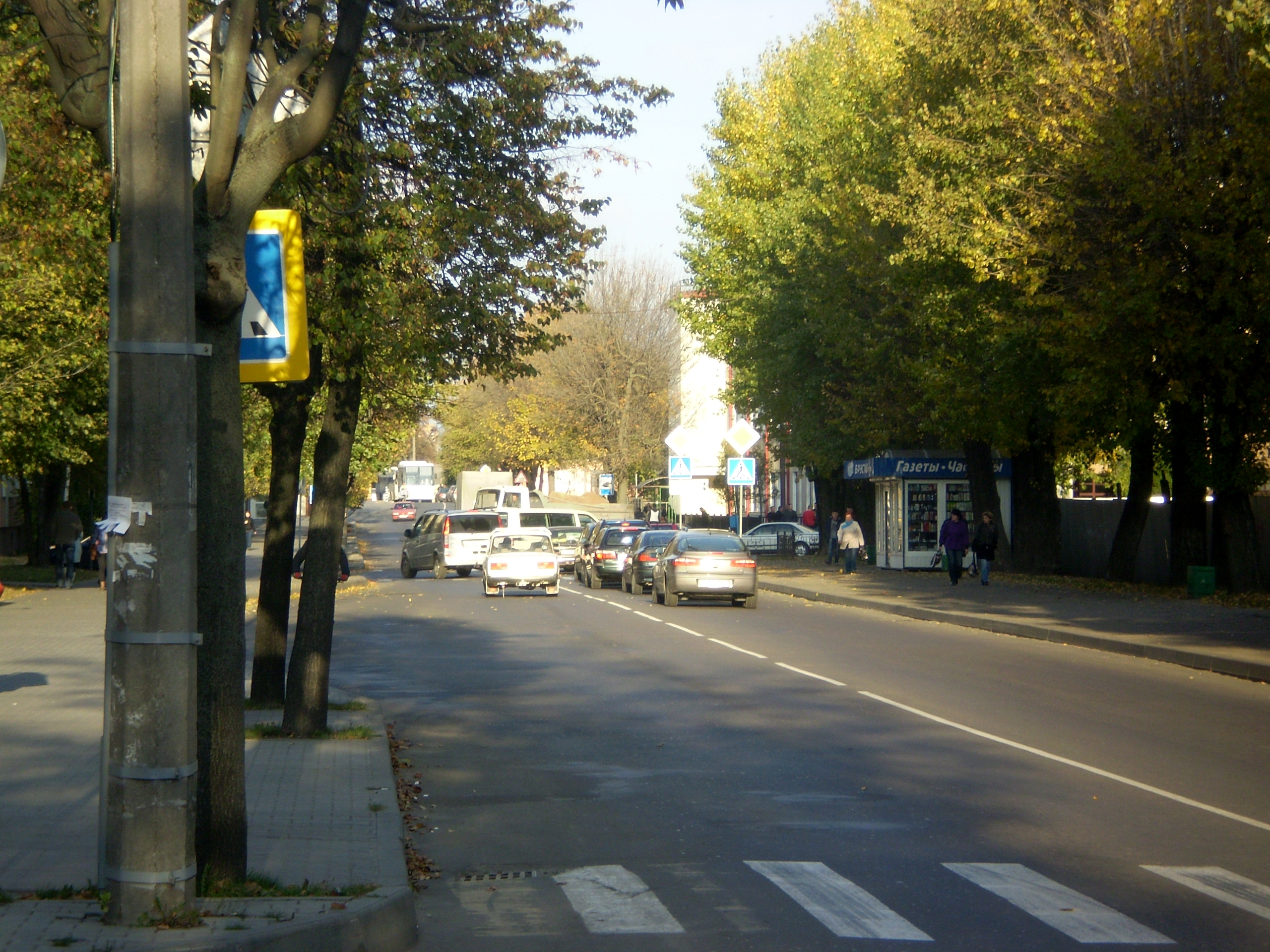 Вул. Пушкінская